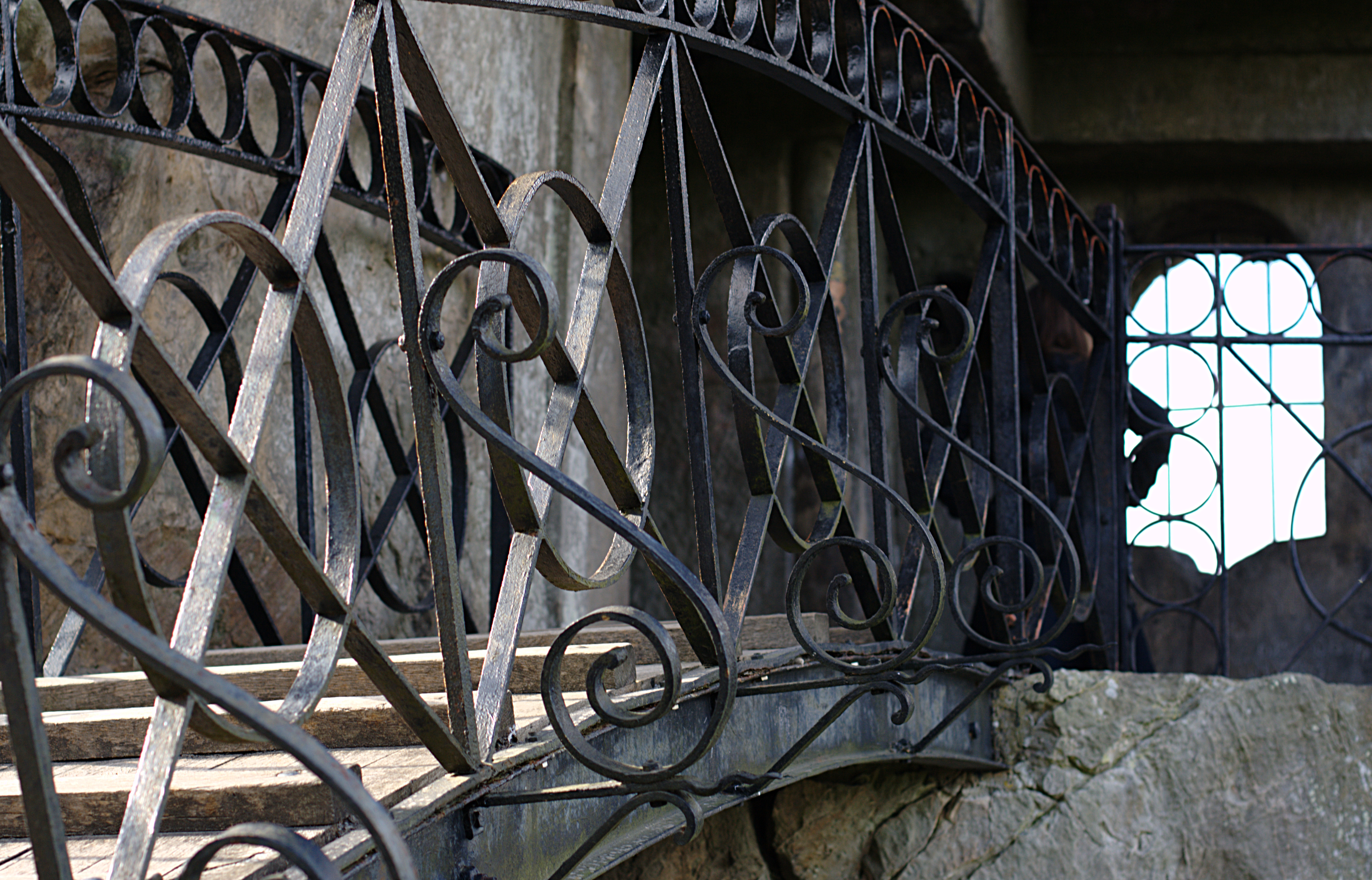 Externsteine, Brücke zwischen den Felsen